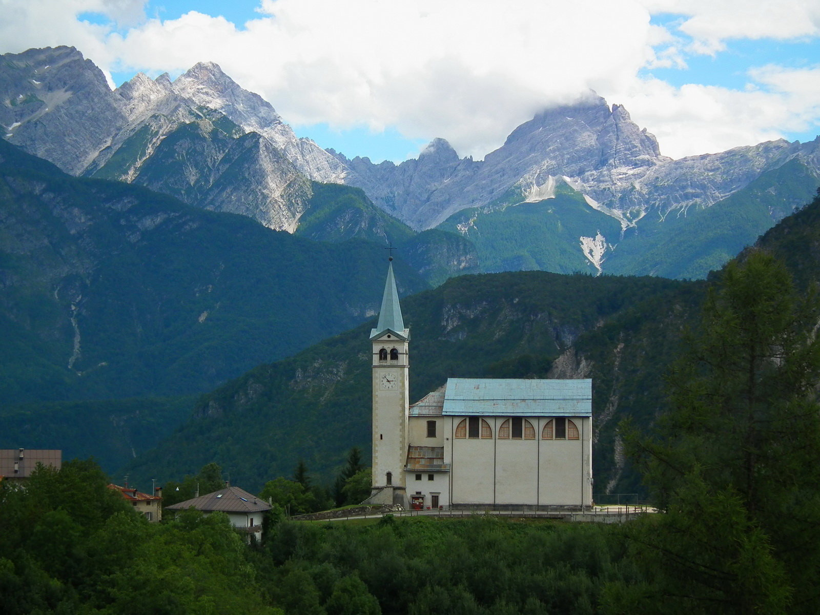 Valle di Cadore, Veneto, Italy